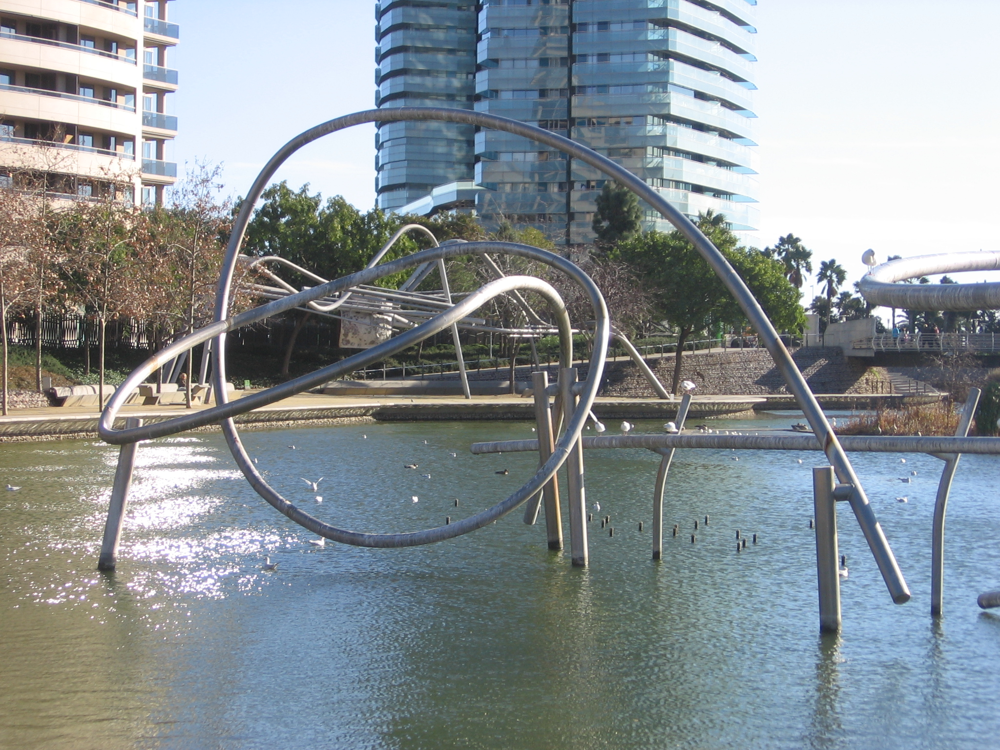 Parque de Diagonal Mar.